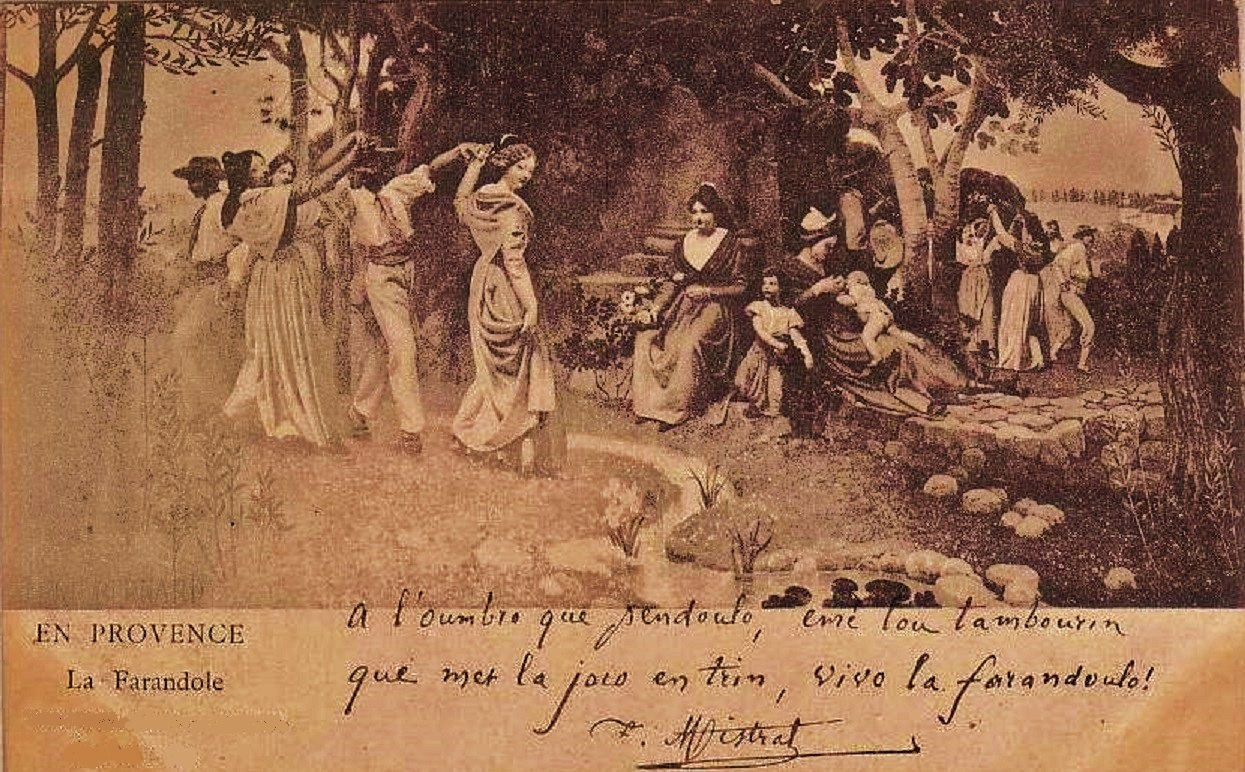 Carte postale de Valère Bernard dédicacée par Frédéric Mistral